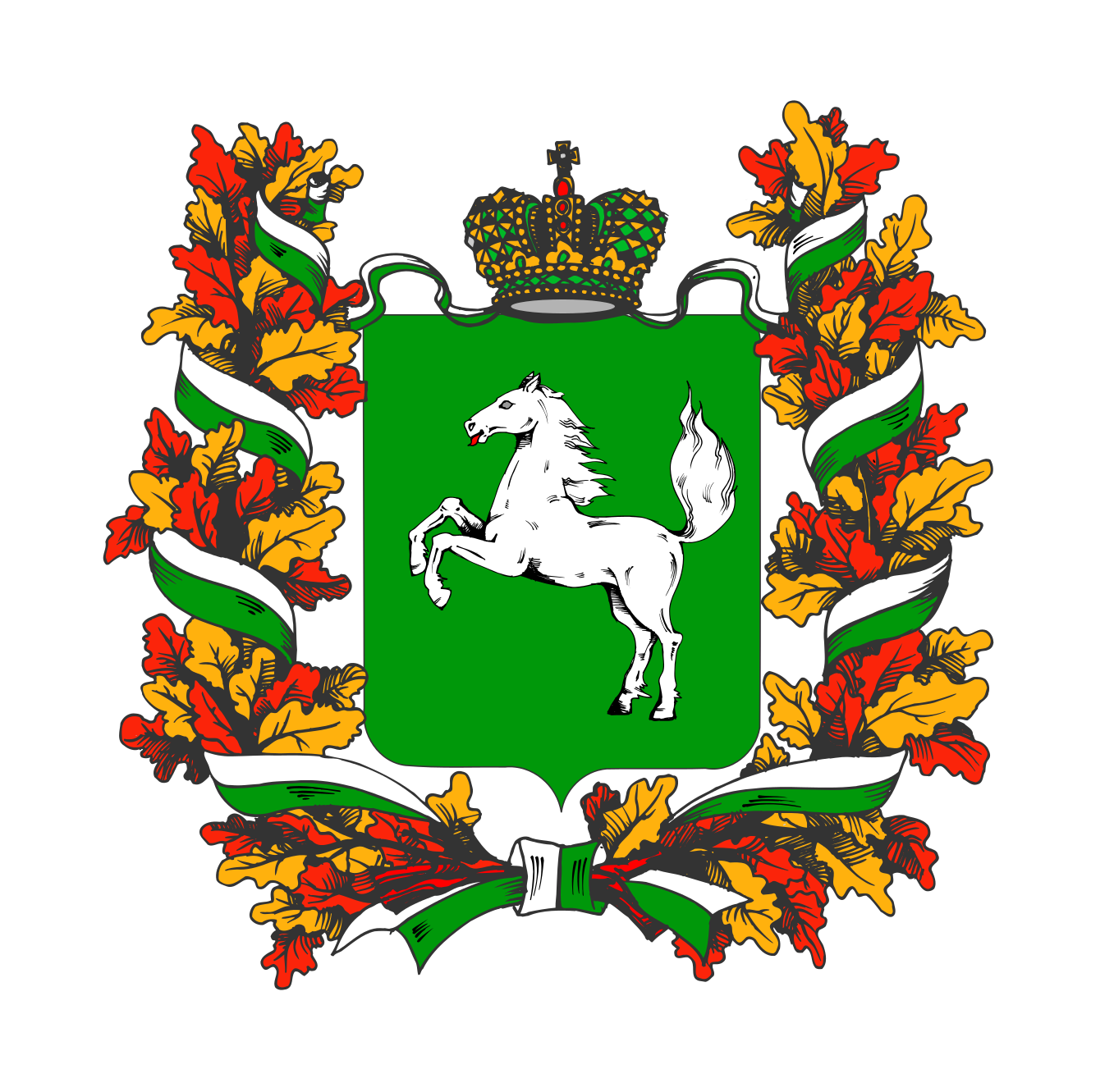 Штандарт Губернатор Томской области